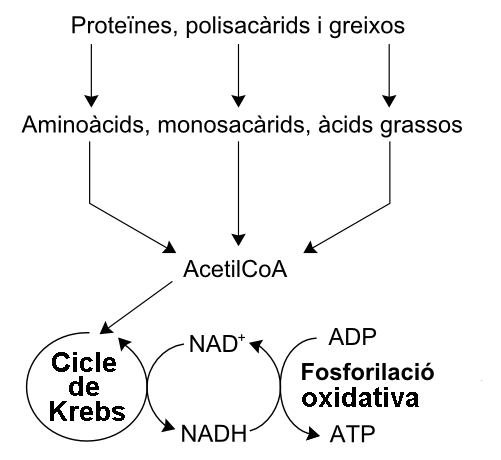 Diagrama simplificat del catabolisme de les proteïnes, els carbohidrats i els greixos.